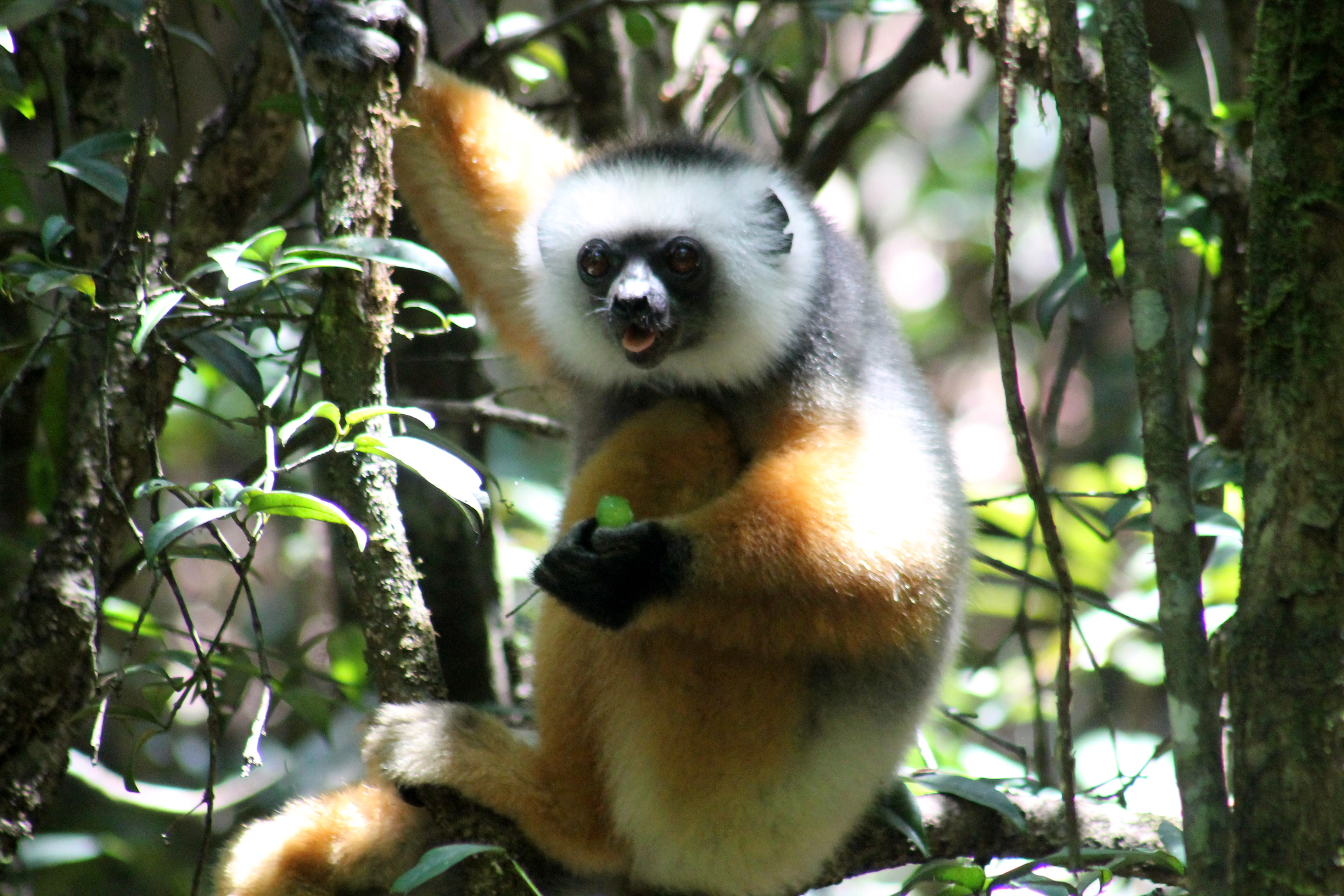 Diadeemsifaka in Andasibe